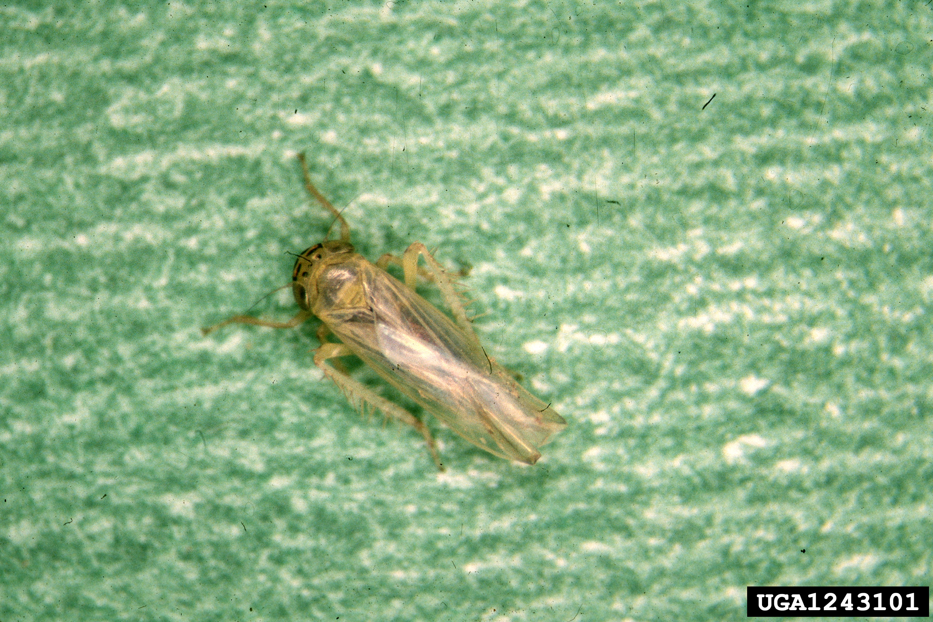 aster leafhopper, Macrosteles quadrilineatus